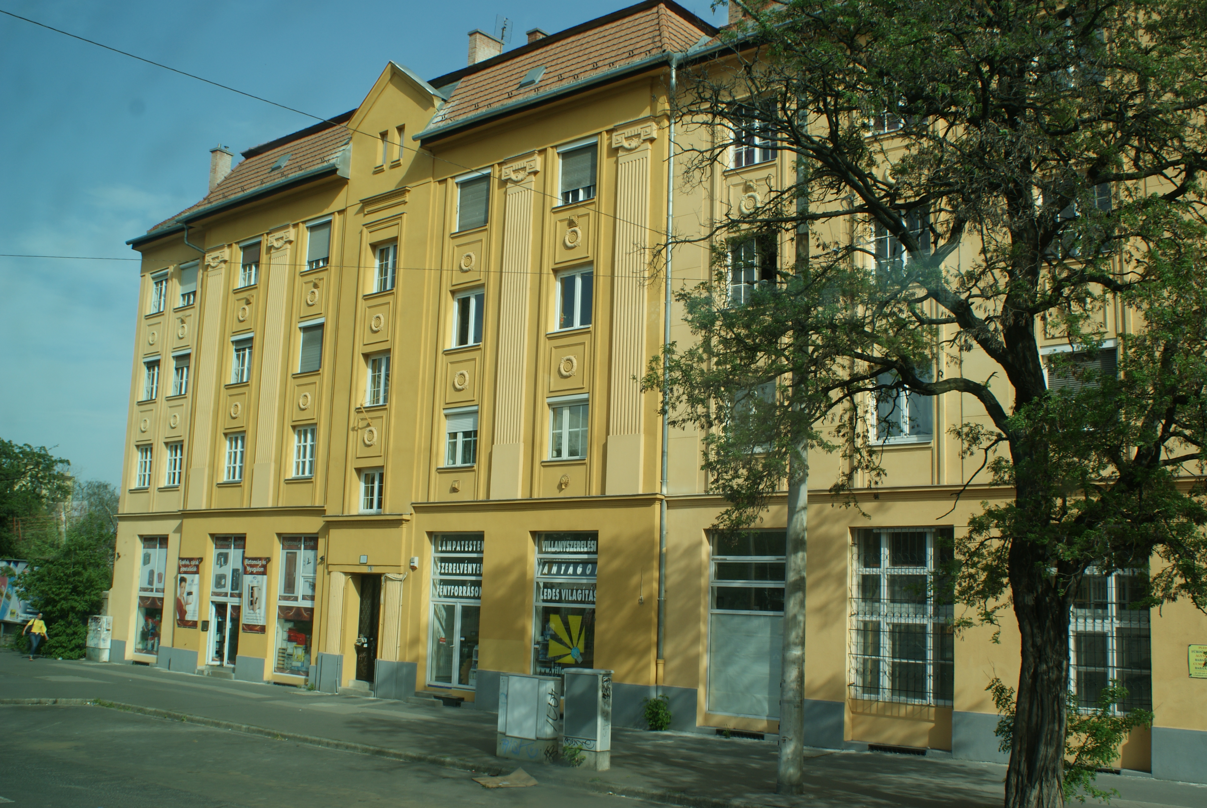 Вуліцы Будапешта